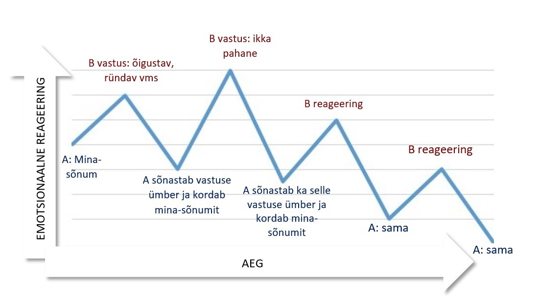 Joonis kirjeldab emotsionaalse taseme muutmist kehtestavalt käitumisel käiguvahetust kasutades